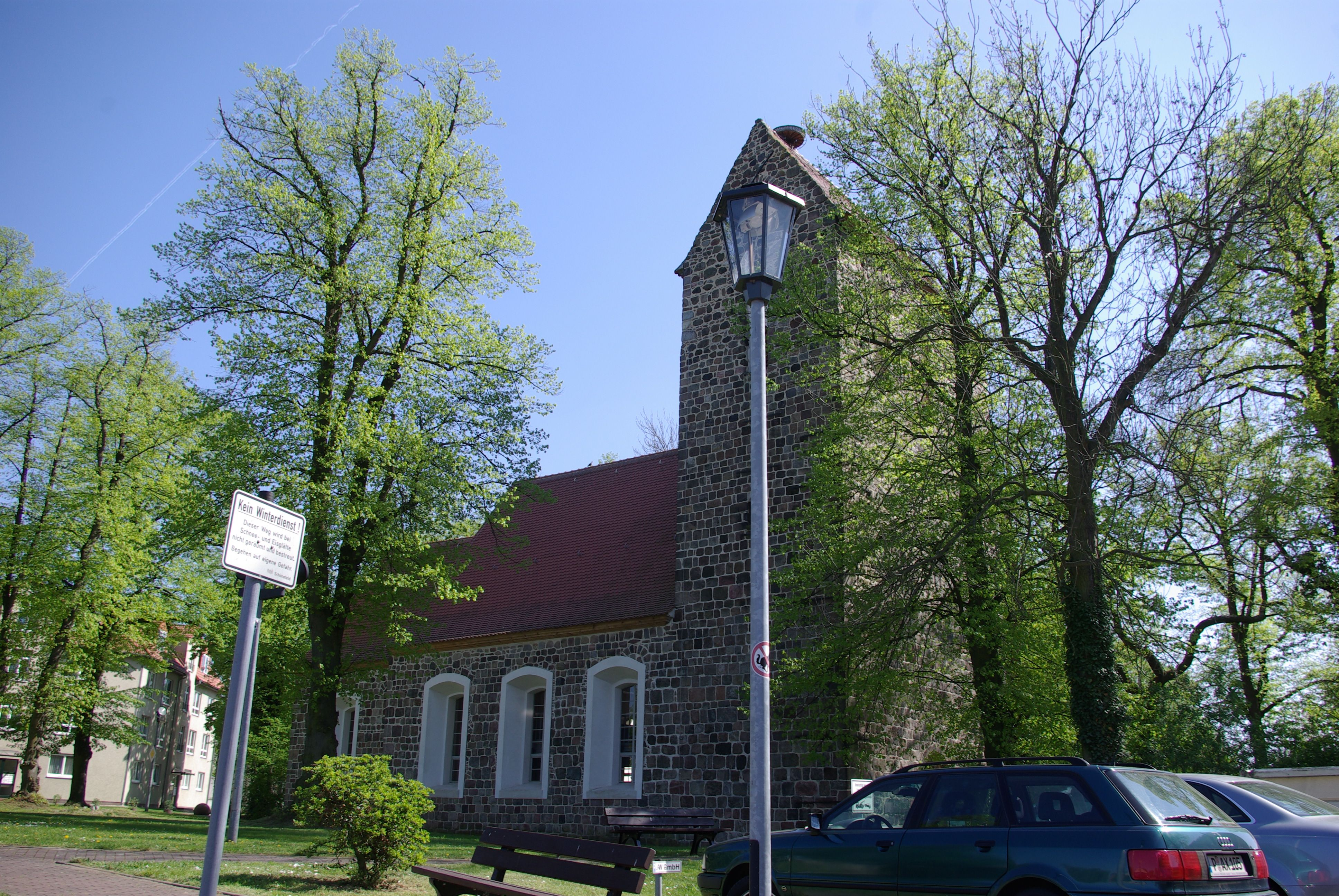 Schönefeld in Brandenburg. Die Kirche im Ortsteil Waltersdorf steht unter Denkmalschutz.